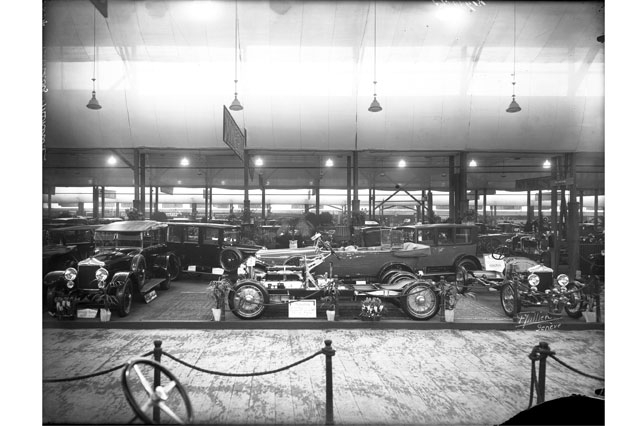 Frank-Henri Jullien (1882-1938), Le Salon de l’automobile au Bâtiment électoral, 1925, négatif au gélatino-bromure d’argent sur verre, inv. VG N 18 x 24 4438